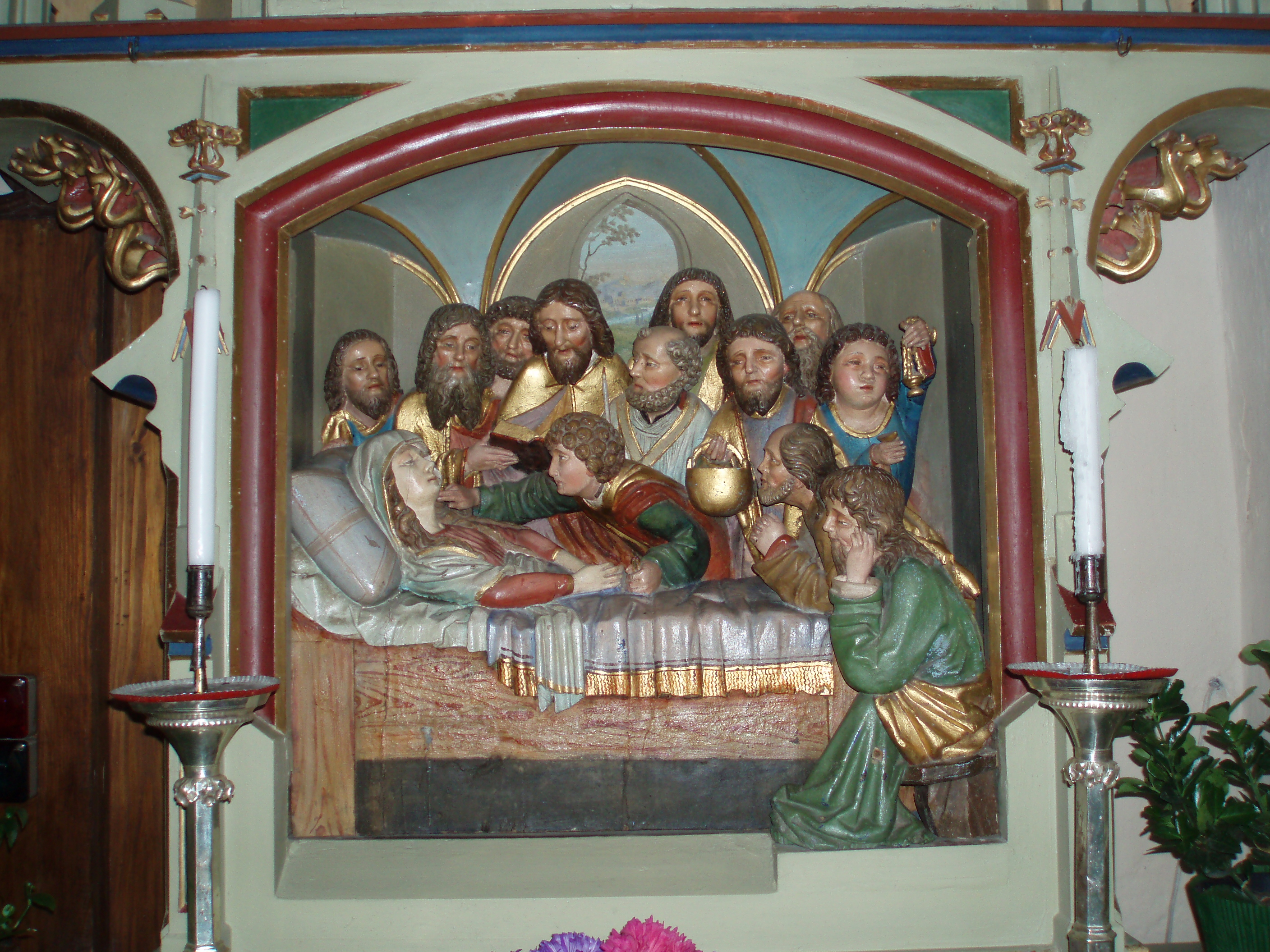 Pfarrkirche von Mölten